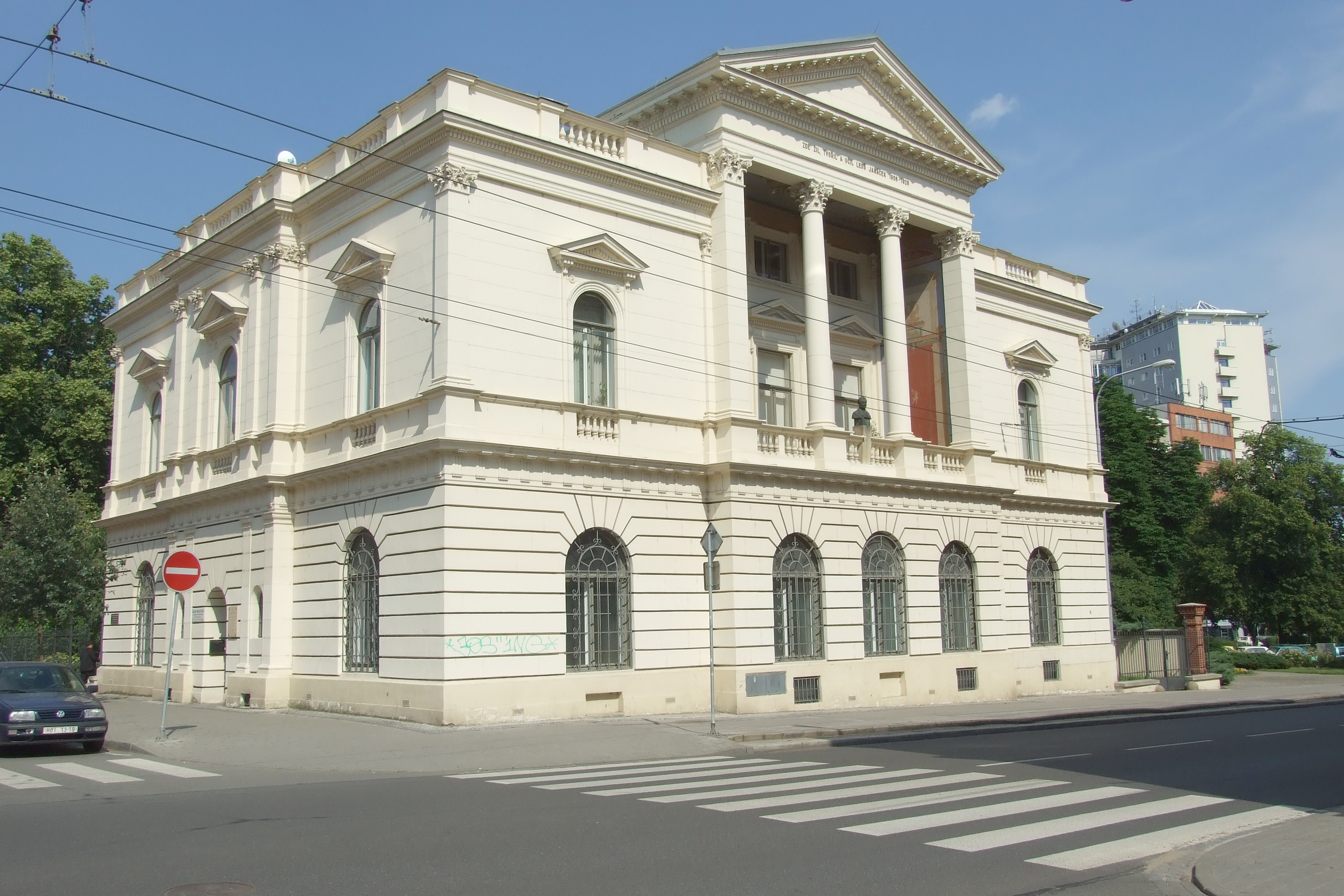 Brno-Veveří - Neoklasicistní vila na nároží Kounicovy a Smetanovy ulice. Dnes se zde nachází Památník Leoše Janáčka, Základní umělecká škola se zaměřením na církevní hudbu, a Varhanická škola biskupství brněnského.